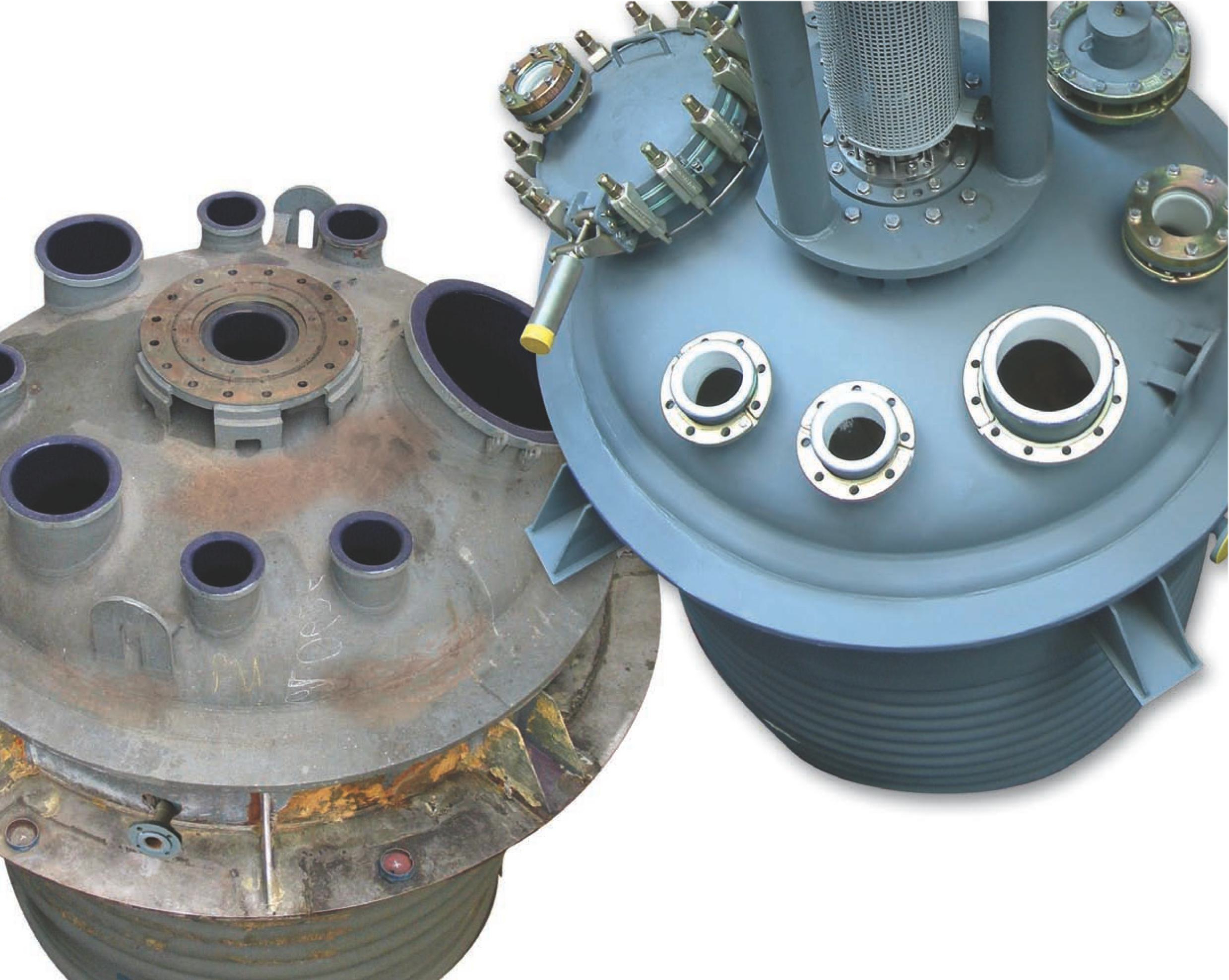 Emaillierter Apparat vor (links) und nach (rechts) einer Reemaillierung